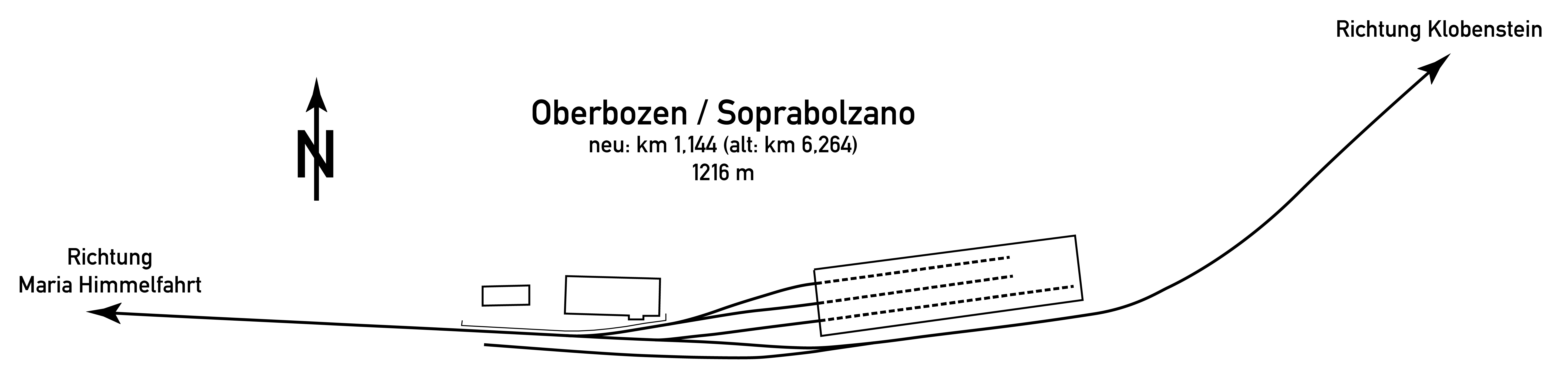 Gleisplan des Bahnhof Oberbozen / Soprabolzano der Rittner Bahn